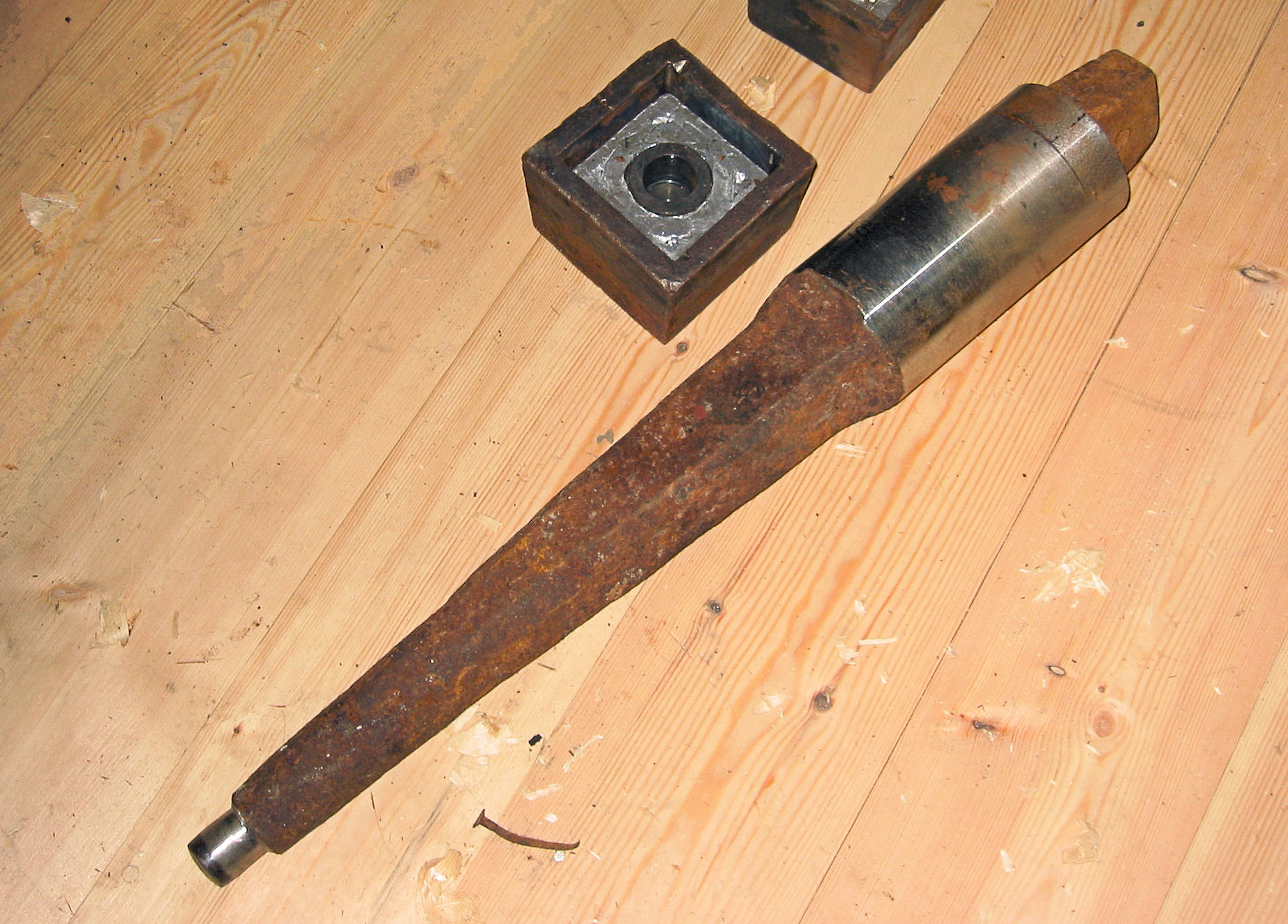 Bolspil met taatspot van de Concordia molen te Ede